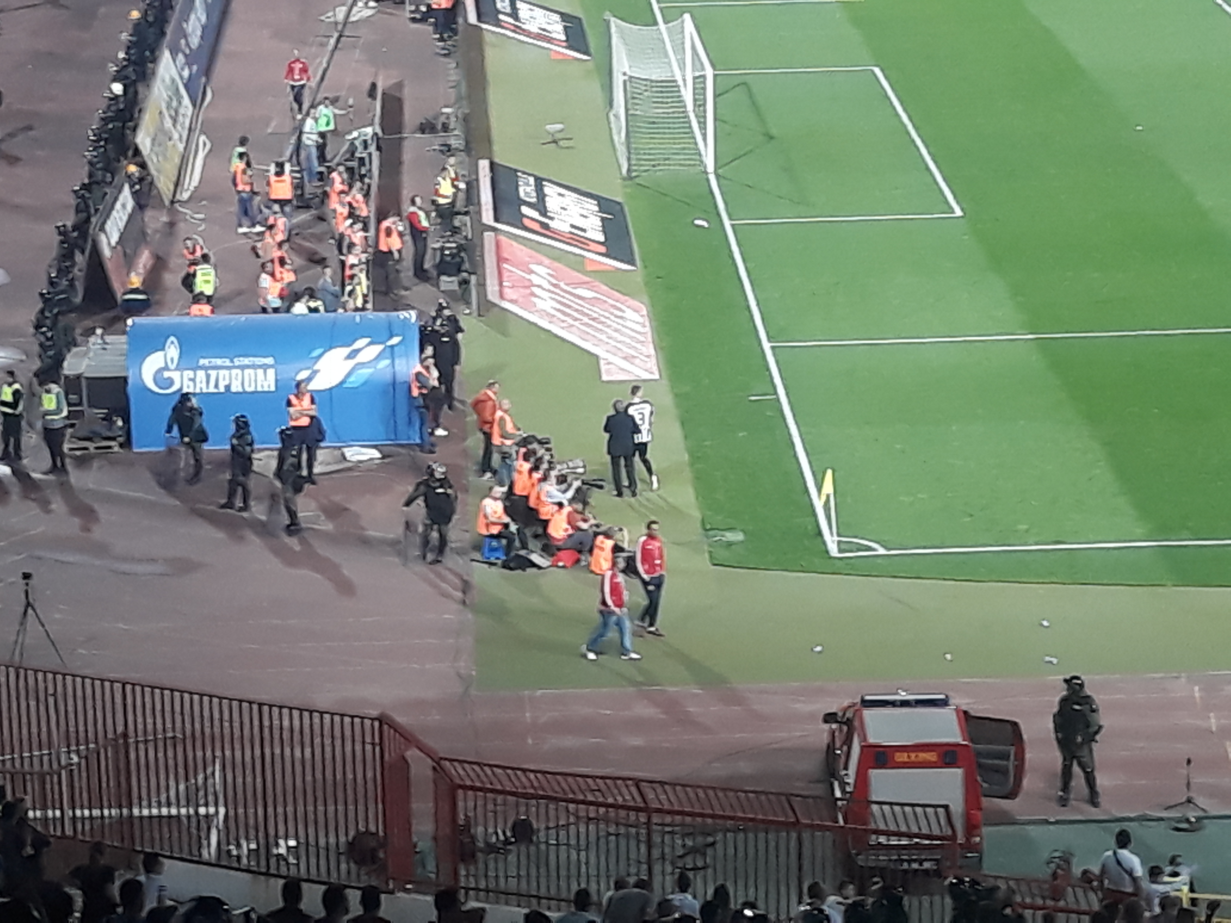 160. Вечити дерби, између Црвене звезде и Партизана, одигран на Стадиону Рајко Митић у Београду.